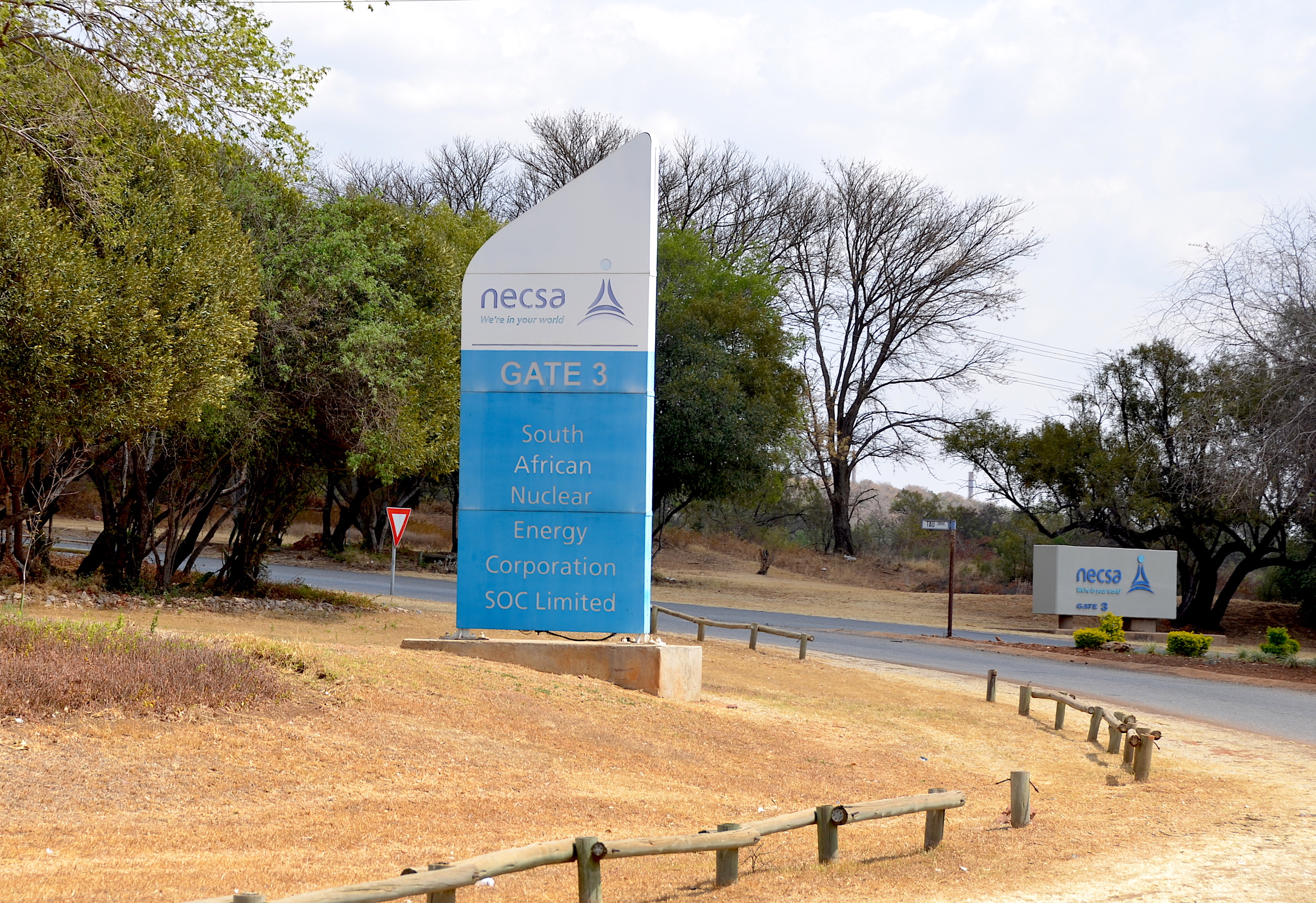 Kernforschungszentrum Pelindaba, Gate 3